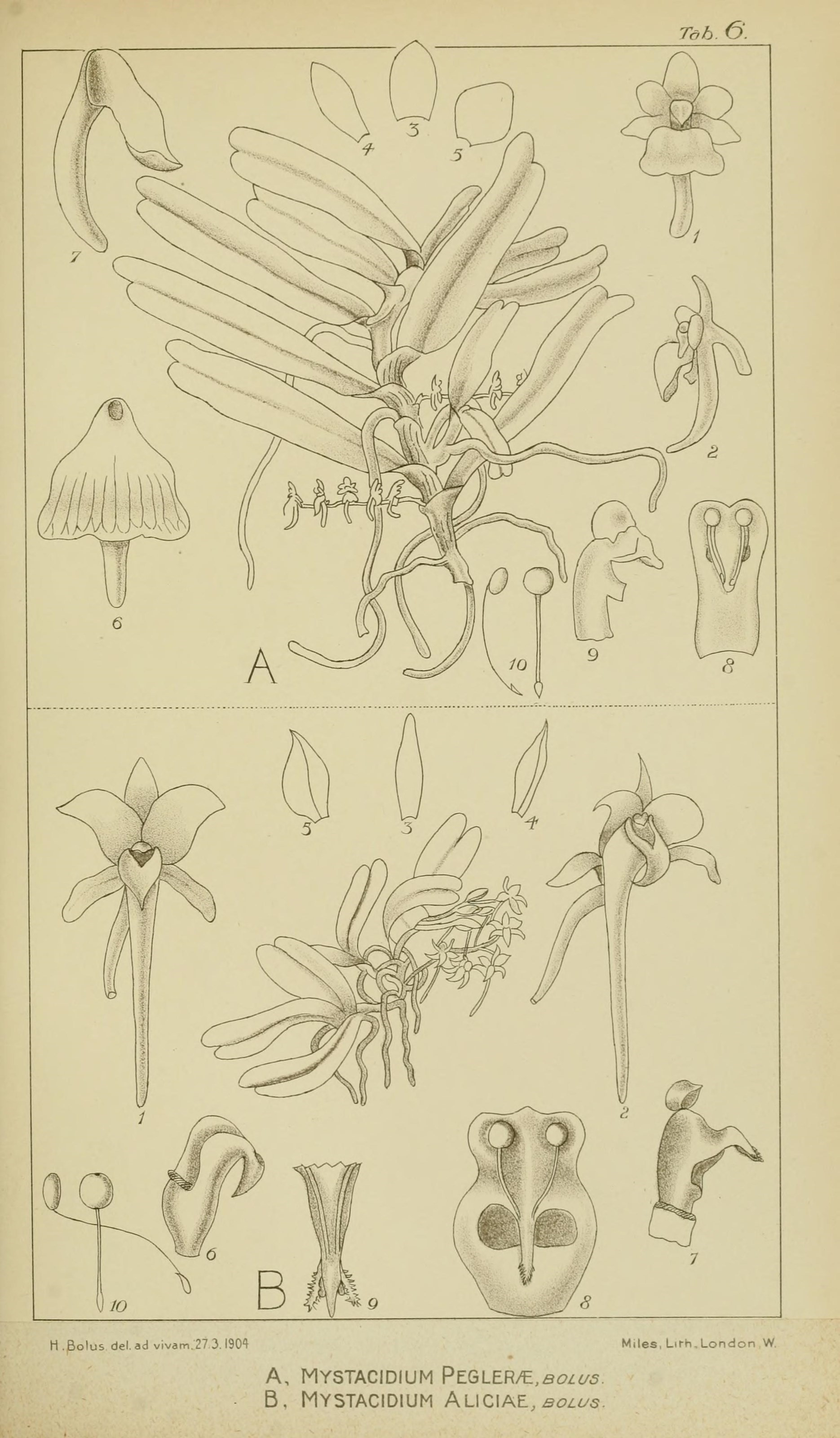 Tab. 6'. H. Bolus del.ad vivatr,.27 3.l90'J Miles, Uirh, London W A, MYSTACIDIUM PEGLER/E,,eo/^5. B. MYSTACIDIUM fKUZXNL, bolus.